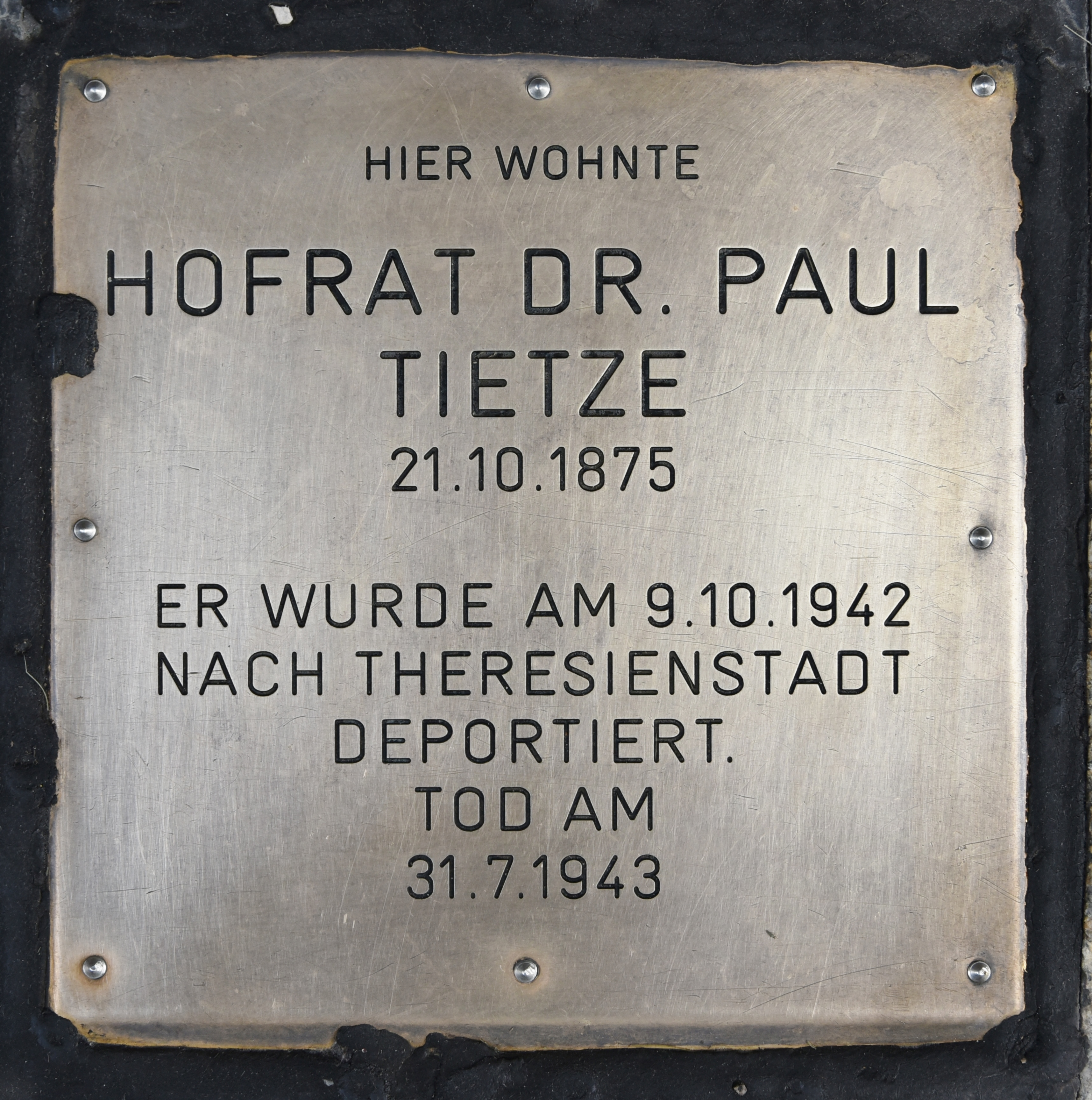 Erinnerungsstein für Hofrat Dr. Paul Tietze